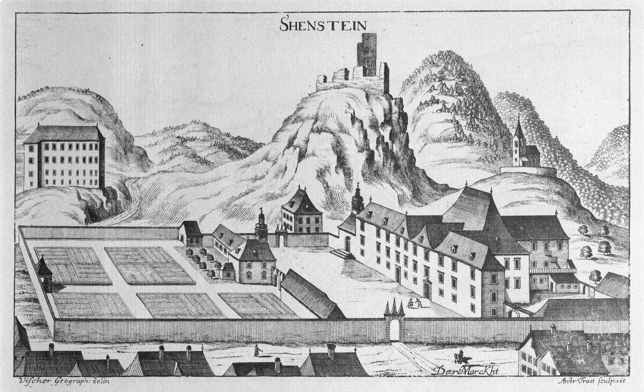 G. M. Vischers Käyserlichen Geographi, Topographia Ducatus Stiriae, Das ist: Eigentliche Delineation / und Abbildung aller Städte / Schlösser / Marcktfleck / Lustgärten / Probsteyen / Stiffter / Clöster und Kirchen / so es sich im Herzogthumb Steyrmarck befinden; Und anjetzo Umb einen billichen Preyß zu finden seynd Bey Johann Bitsch Universitäts Buchhandlern / Auff dem Juden=Platz bey der guldenen Saulen. Graz 1681 Die Nummerierung der Dateien folgt der alphabetischen Reihung der Ortsnamen und entspricht nicht dem Vischer-Register